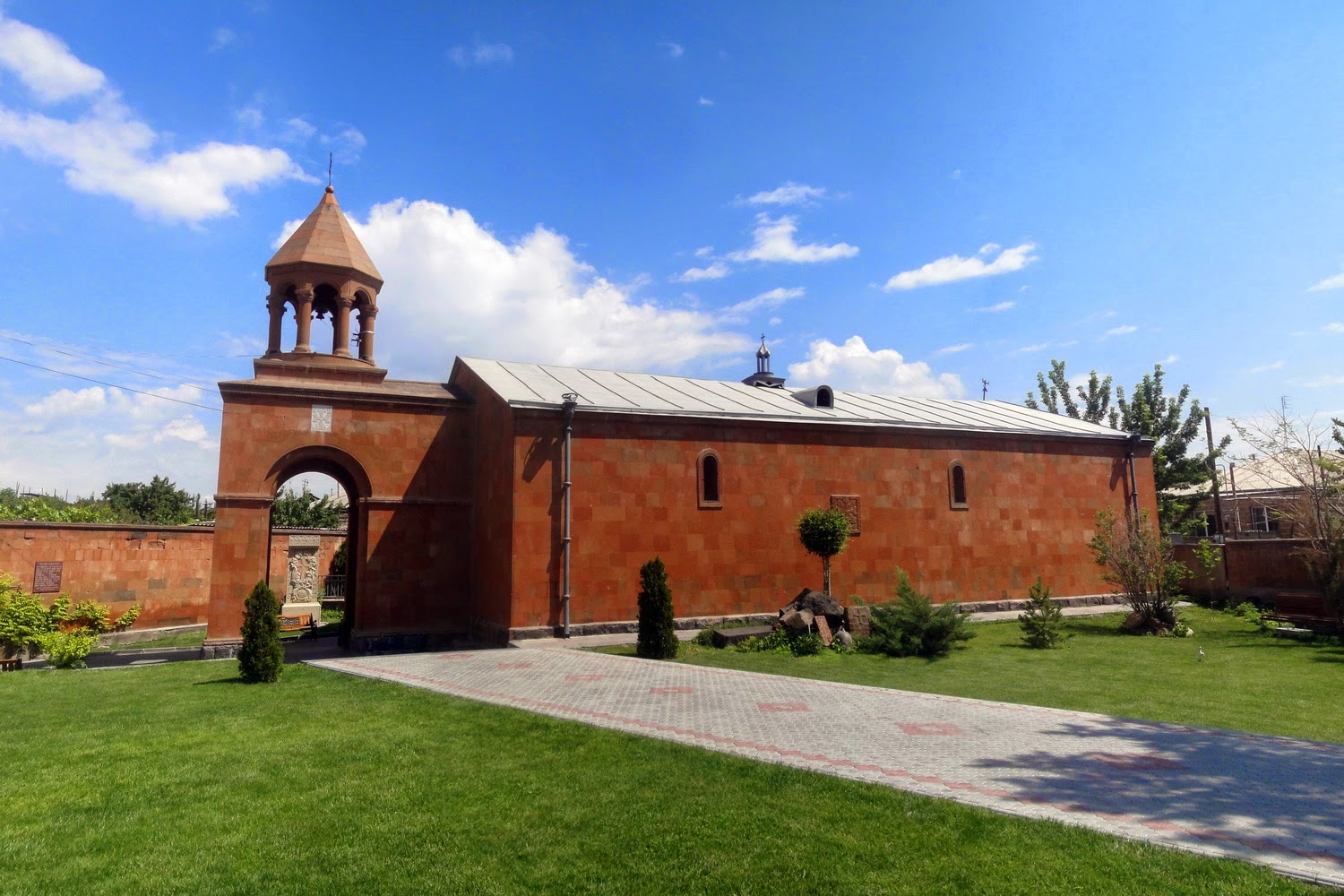 Pharaqar, S. Haruthyun, 2014.05.27